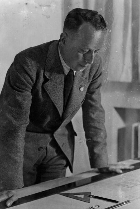 Hermann Giesler Scherl: Der Schöpfer des "Hauses Elephant " in Weimar. Im Rahmen des Gautages des Gaues Thüringen wird am kommenden Wochenende in Weimar das neue "Haus Elephant " nach einjähriger Bauzeit feierlich eröffnet. Dieses "Kleinod der NSDAP", wie es in Thüringen genannt wird, soll dem Führer, der in dem alten Hause seit 1925 achtundzwanzig Mal Wohnung genommen hat, gewidmet werden. Sein Schöpfer ist der Erbauer der Ordensburg Sonthofen im Allgäu, Professor Hermann Giesler. 1.11.38 [Herausgabedatum] Presse-Illustrationen Hoffmann 16729-38 Abgebildete Personen: Giesler, Hermann Prof.: 1898-1987; Architekt, Generalbaurat für München, Reichsbaurat für Linz, NSDAP-Mitglied, Deutschland (GND 118539221)